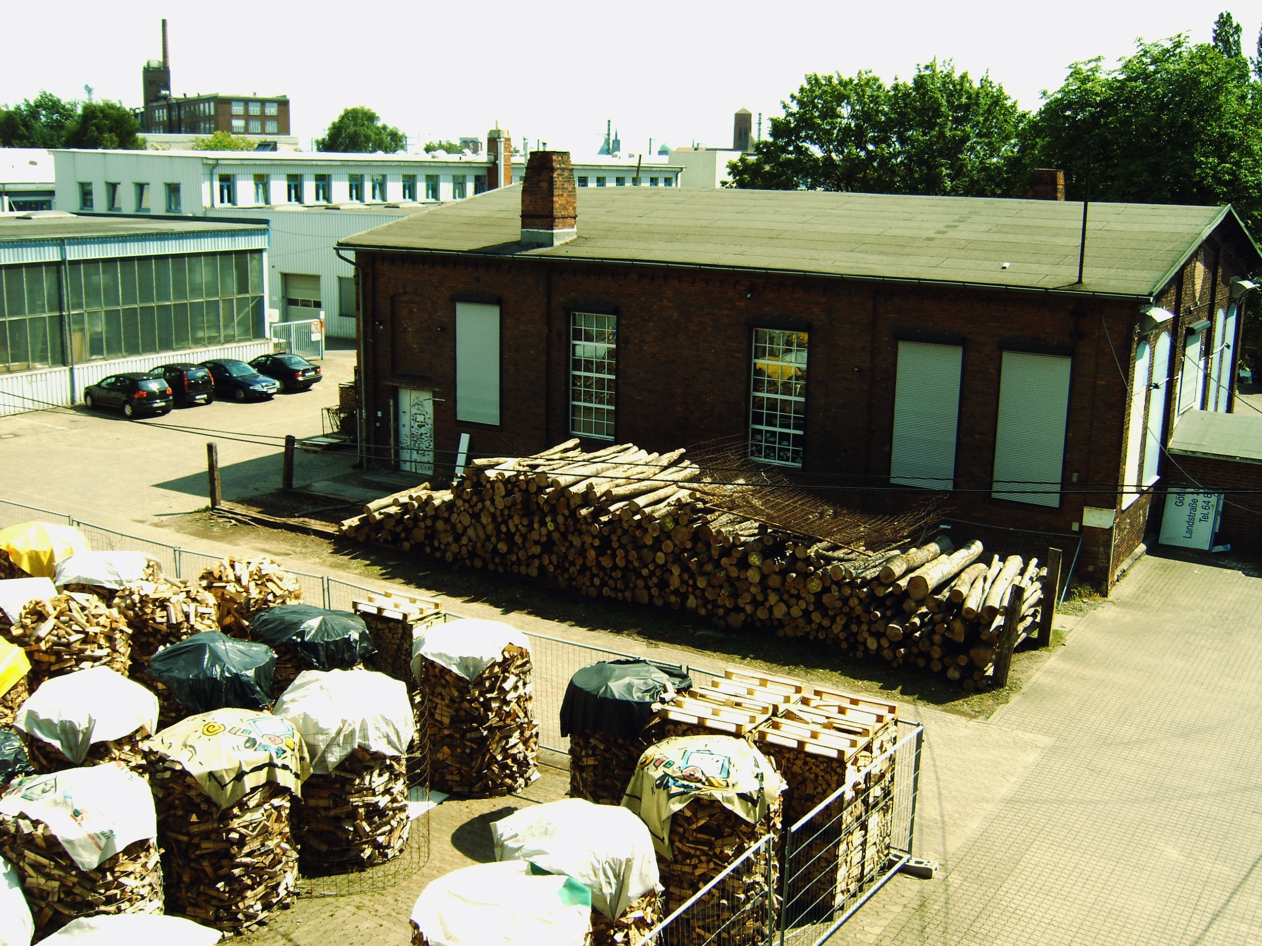 Blick aus dem zweiten Stock der ehemaligen Modellhalle (heute Sitz vom MusikZentrum Hannover) über das Gelände der ehemaligen Maschinenbau-Firma Knoevenagel. Ganz im Hintergrund sind die Gebäude der Continental AG zu sehen. Die weißen Hallen davor waren früher ein einziges Gebäude mit einem eigenen Gleisanschluß, der quer durch die Gebäude hindurchführte.